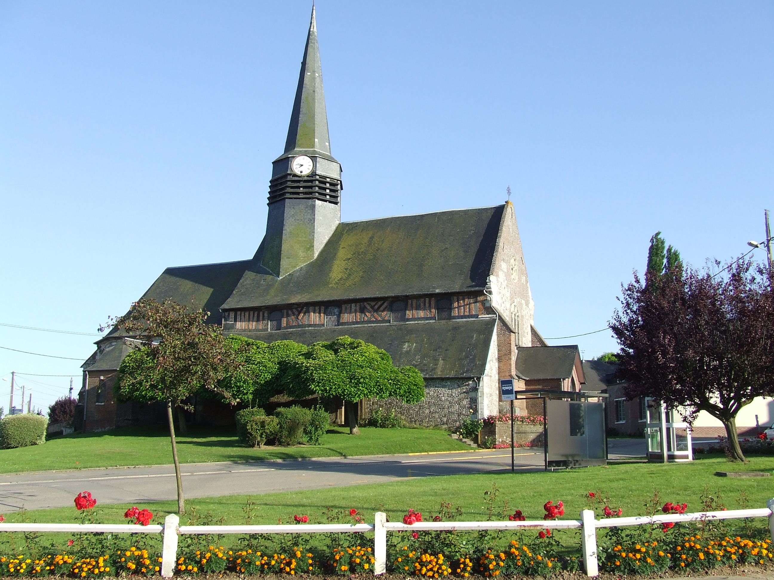 Eglise de Moliens